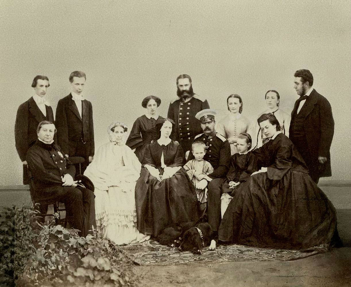 Государь император Александр II с семейством в гостях у Т.Б. Потемкиной В августе 1861 года по приглашению А. М. и Т. Б. Потемкиных Святые Горы посещает император Александр II с семейством. В память о пребывании в гостеприимном доме Потемкиных императорское семейство сфотографировалось вместе с владельцами имения. Фотограф запечатлел малолетних детей императорской семьи - Марию Александровну и Сергея Александровича, фрейлину княжну Долгорукую, воспитательницу Анну Тютчеву, графа П. Шувалова и графа Александра Адлерберга.